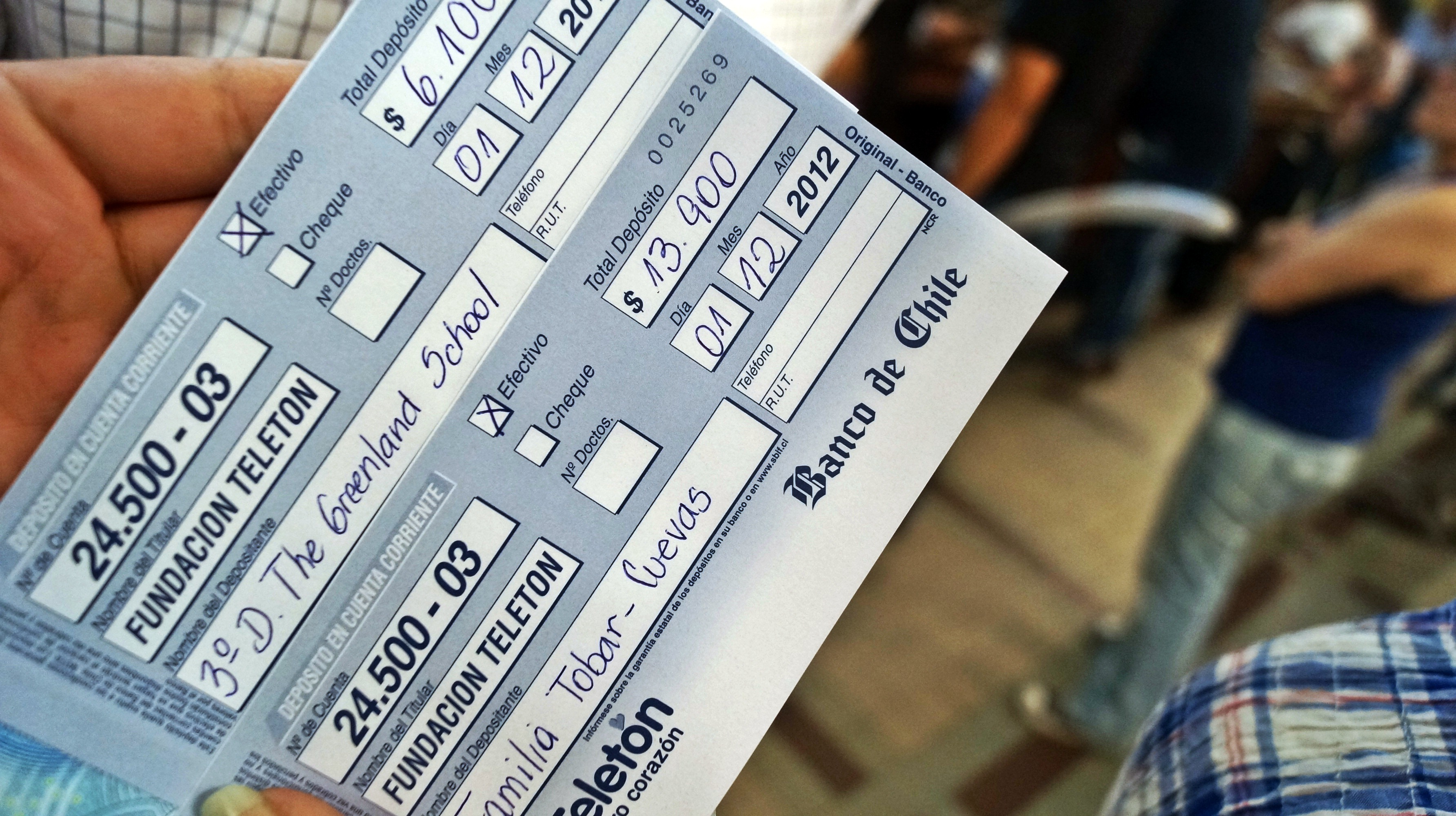 Comprobante de Depósito para la Teletón 2012 en Chile con dos montos indicados